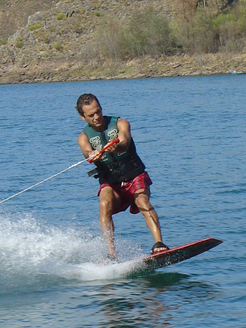 João Pedro, Rio Zêzere, Portugal